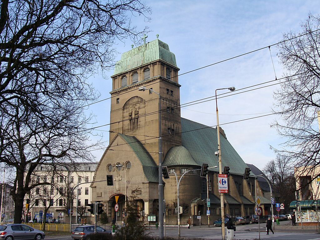 Szczecin - Kościół Najświętszego Serca Pana Jezusa na Placu Zwycięstwa